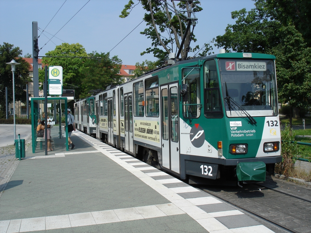 Title: Potsdam